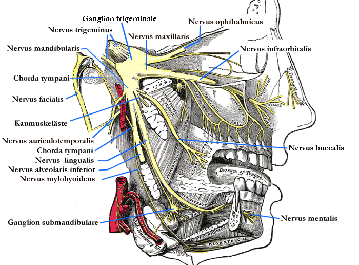 Image:Gray778.png, nachbearbeitet und Beschriftung modifiziert (Deutsch/german) von Benutzer:Uwe Gille